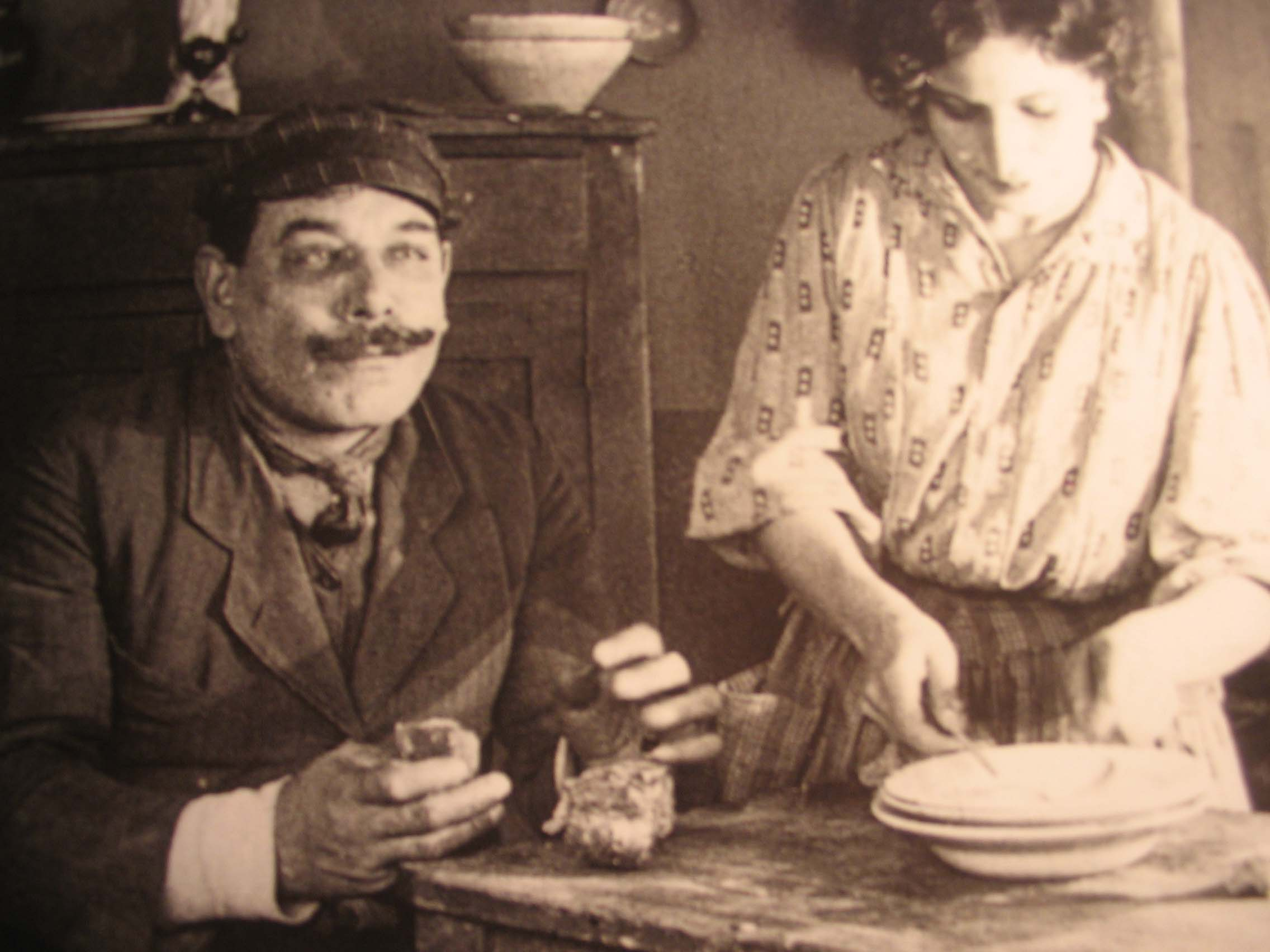 Giovanni Grasso and Rosa Balistreri in Sperduti nel buio